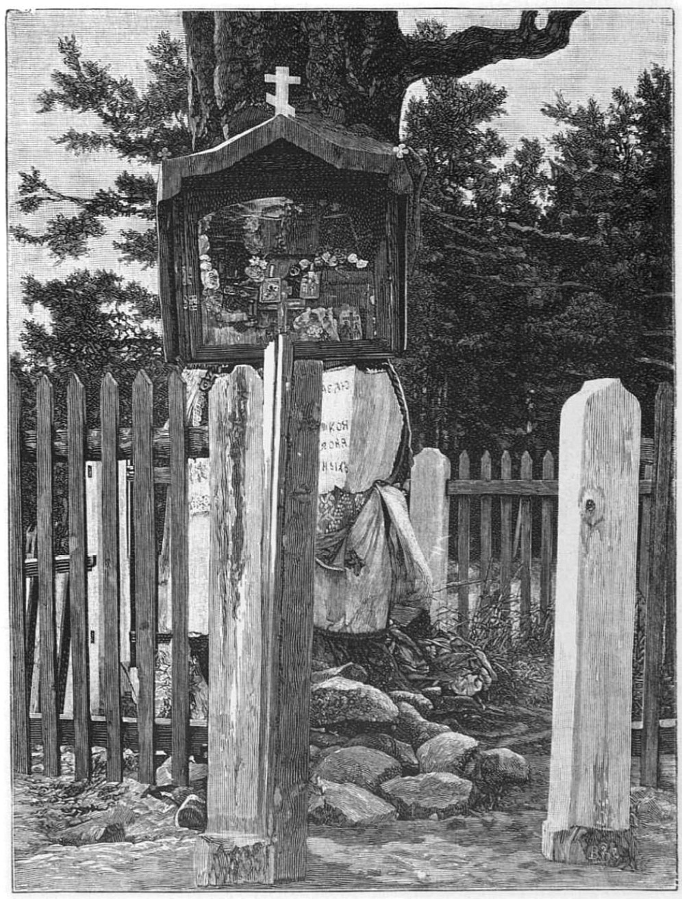 Сосна близ селения Лахты, на берегу Финского залива. Вид нижней части сосны с киотом и неугасимой лампадой (1892 г.).